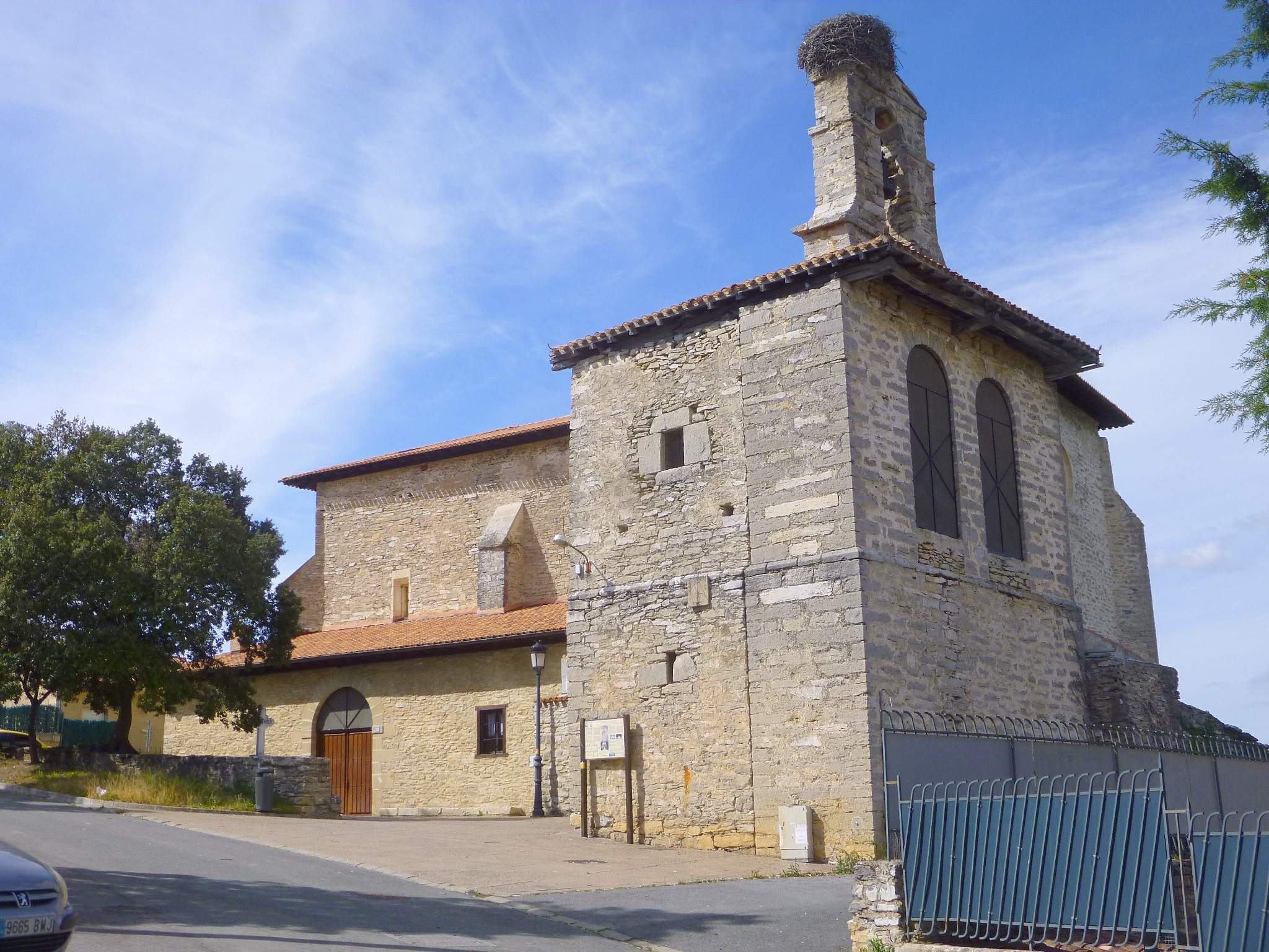 Víllodas (Álava) - Iglesia de San Cristóbal